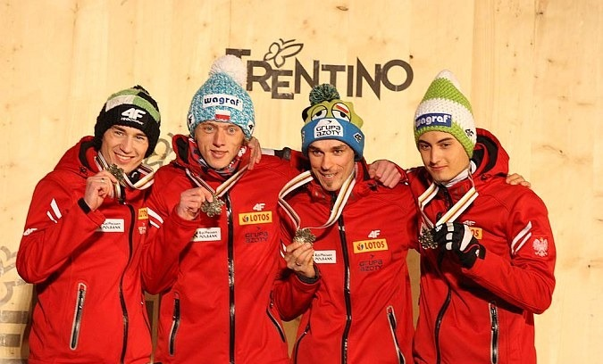 Dekoracja medalowa konkursu drużynowego mężczyzn na skoczni K-120